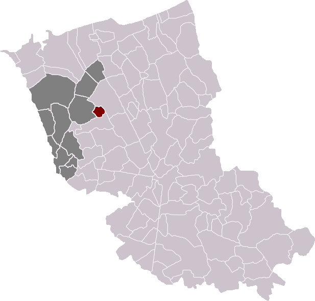 Locatie gemeente Drinkam in arrondissement Duinkerke. Zelfgemaakt. Location of Drincham municipality in the arrondissement of Dunkirk. Self made. Localisation de la commune de Drincham dans l'arrondissement de Dunkerque. Fait moi-même.